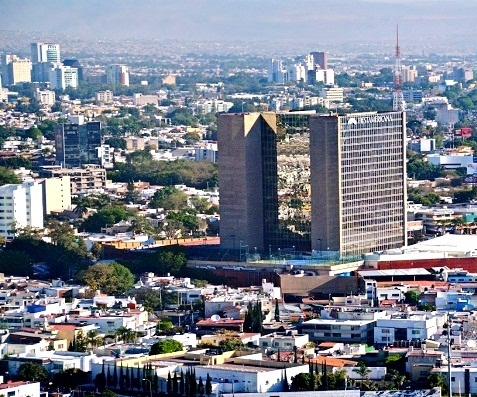 Clima Gdl 20 ago 2013 - Lopez Mateos Sur (Zona Minerva)